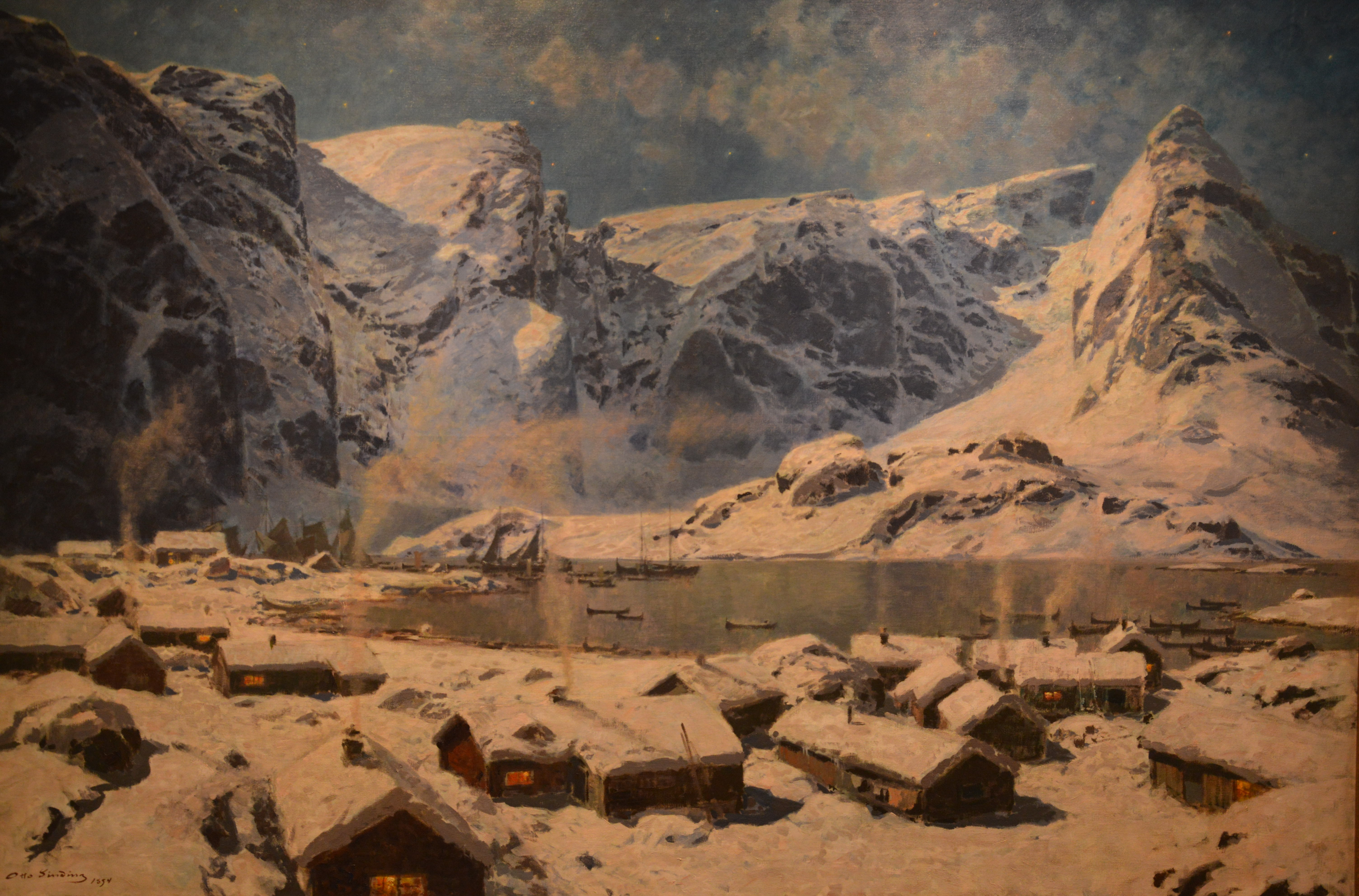 Winter, Reine in Lofoten